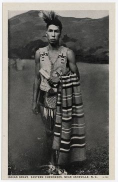 ჩეროკი მამაკაცი